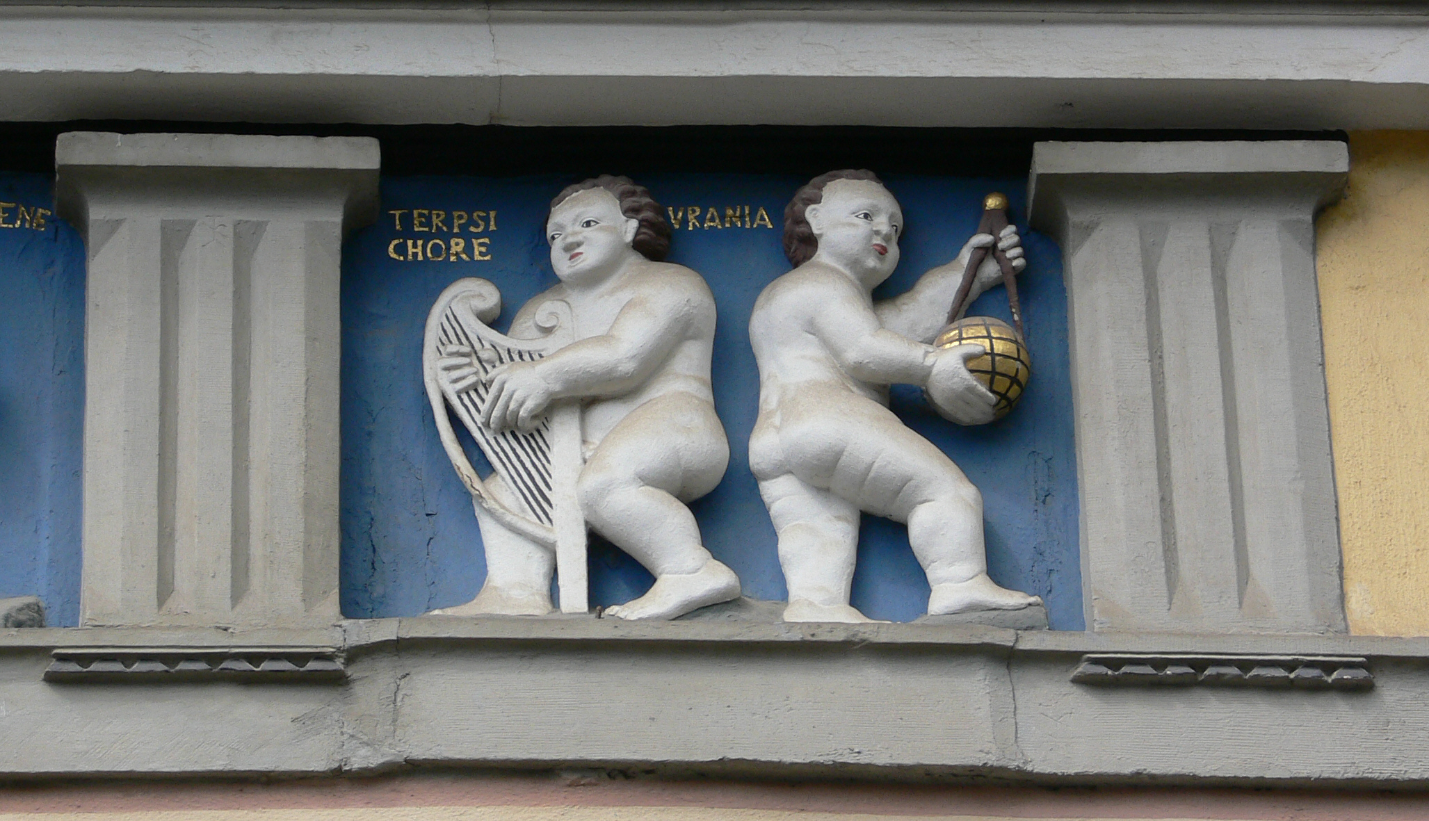 Terpsichore und Urania, Relief am Haus zum Roten Ochsen, Fischmarkt, Erfurt